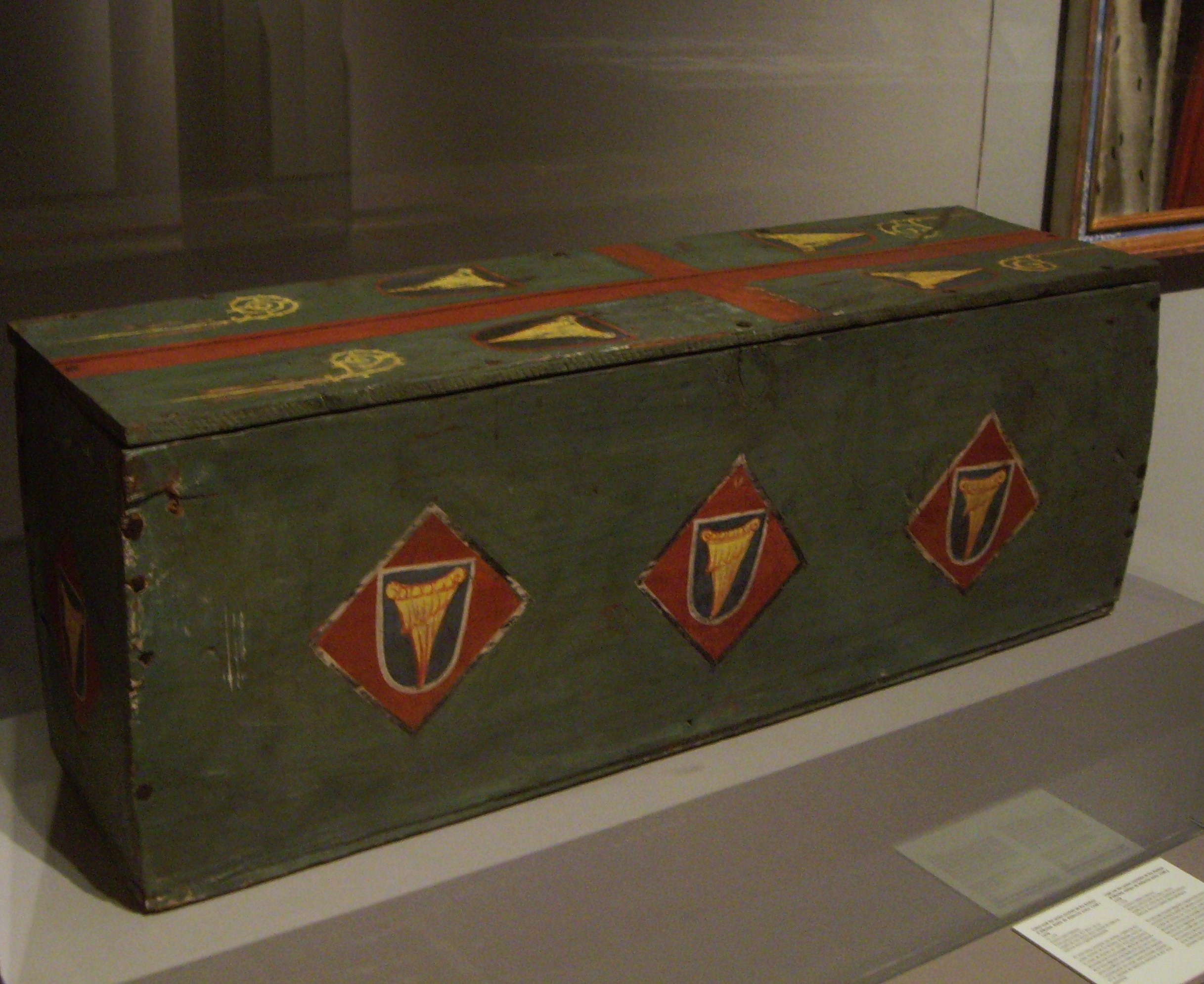 Fèretre que estava dins del sepulcre del que fou tercer bisbe de valència (entre 1248 i 1276) i qui va col·locar la primera pedra de la catedral de València. Del segle XIII, gòtic, el sepulcre es redescobrí l'any 2008 i actualment es troba a la capella de Sant jaume Apòstol de la catedral de València. És un taüt de fusta pintat de verd i decorat amb l'emblema dels Albalat, l'ala.